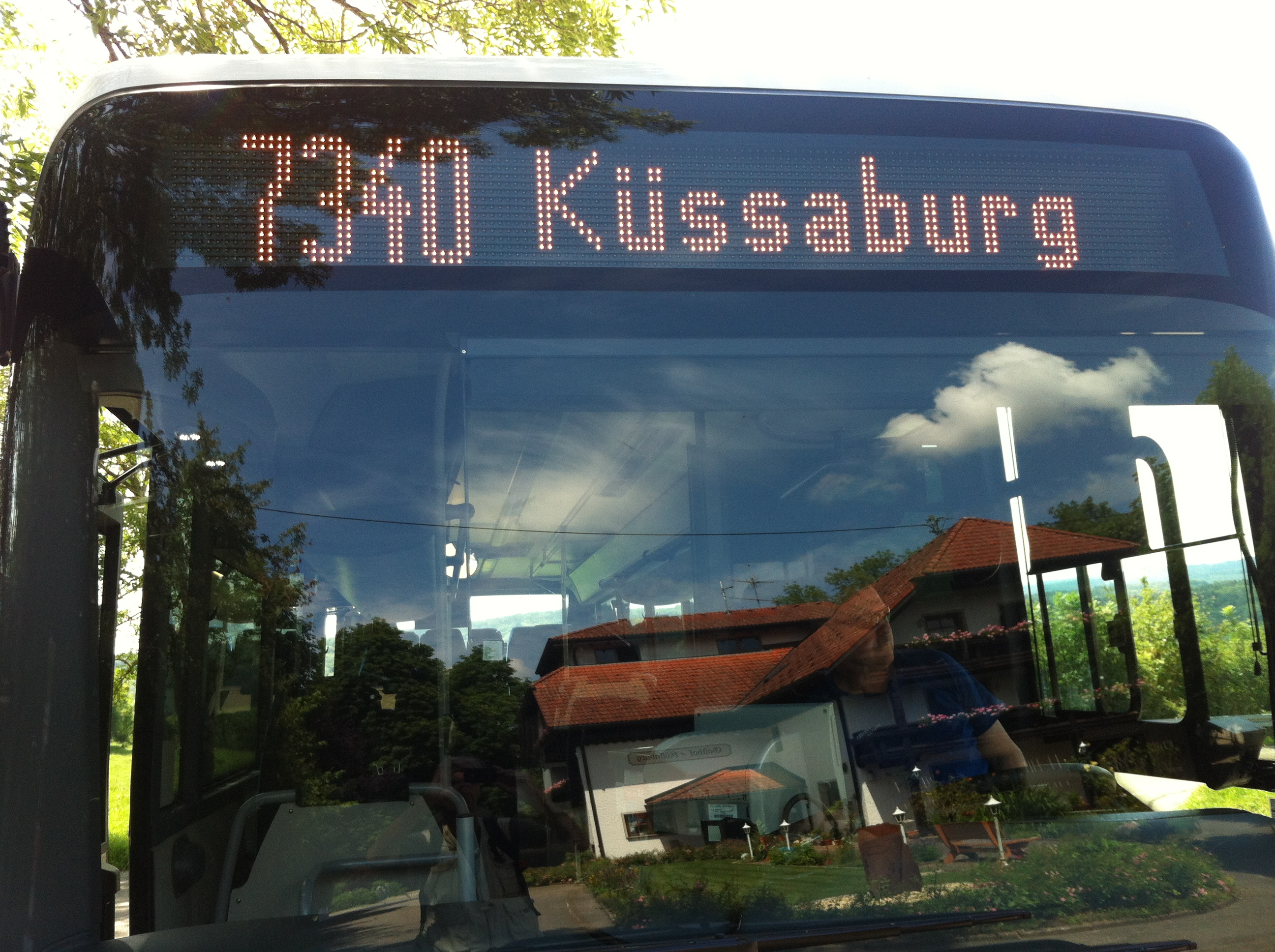 Bus der Linie 7340 der Südbaden-Busgesellschaft (SBG), der mehrfach am Tag die Küssaburg anfährt